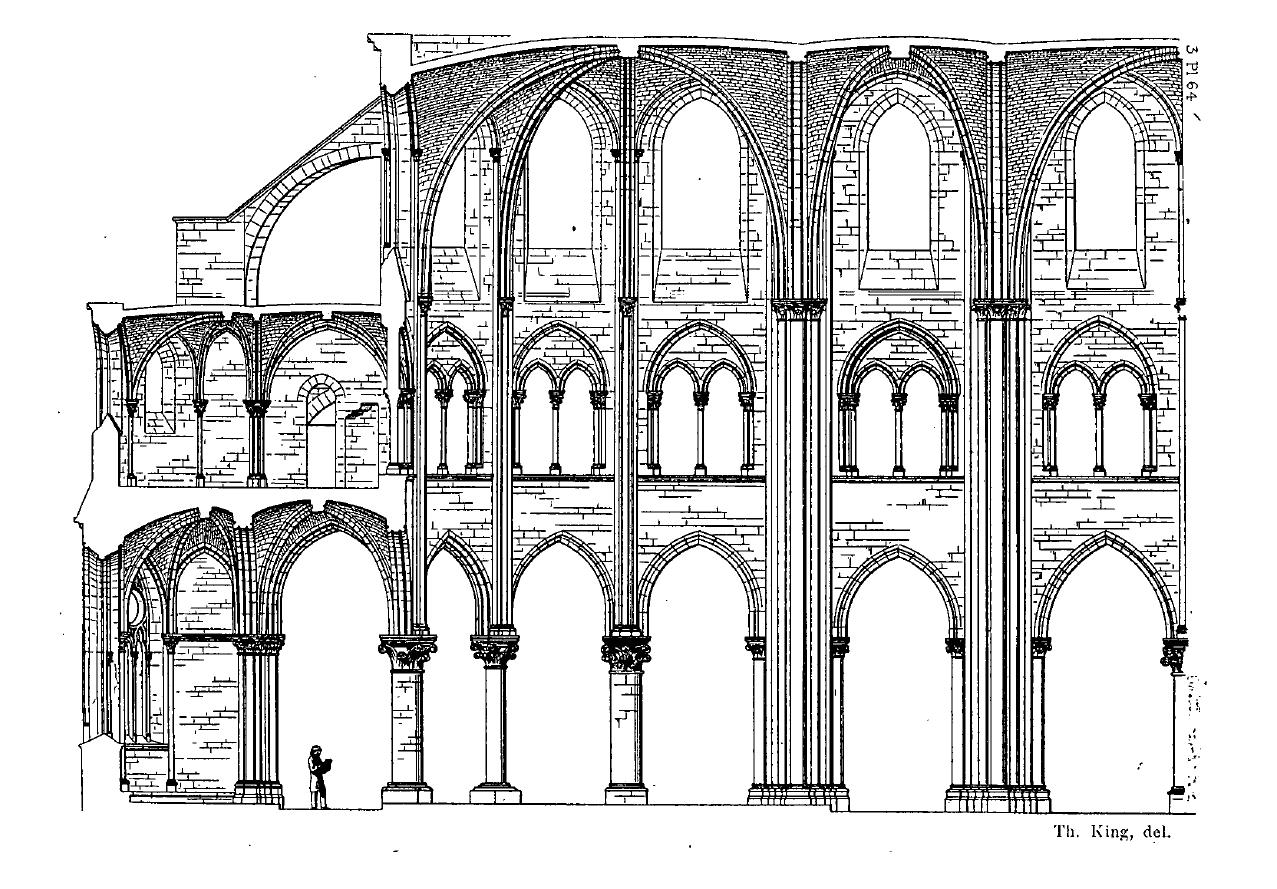 Coupe de l'abside et du chœur.